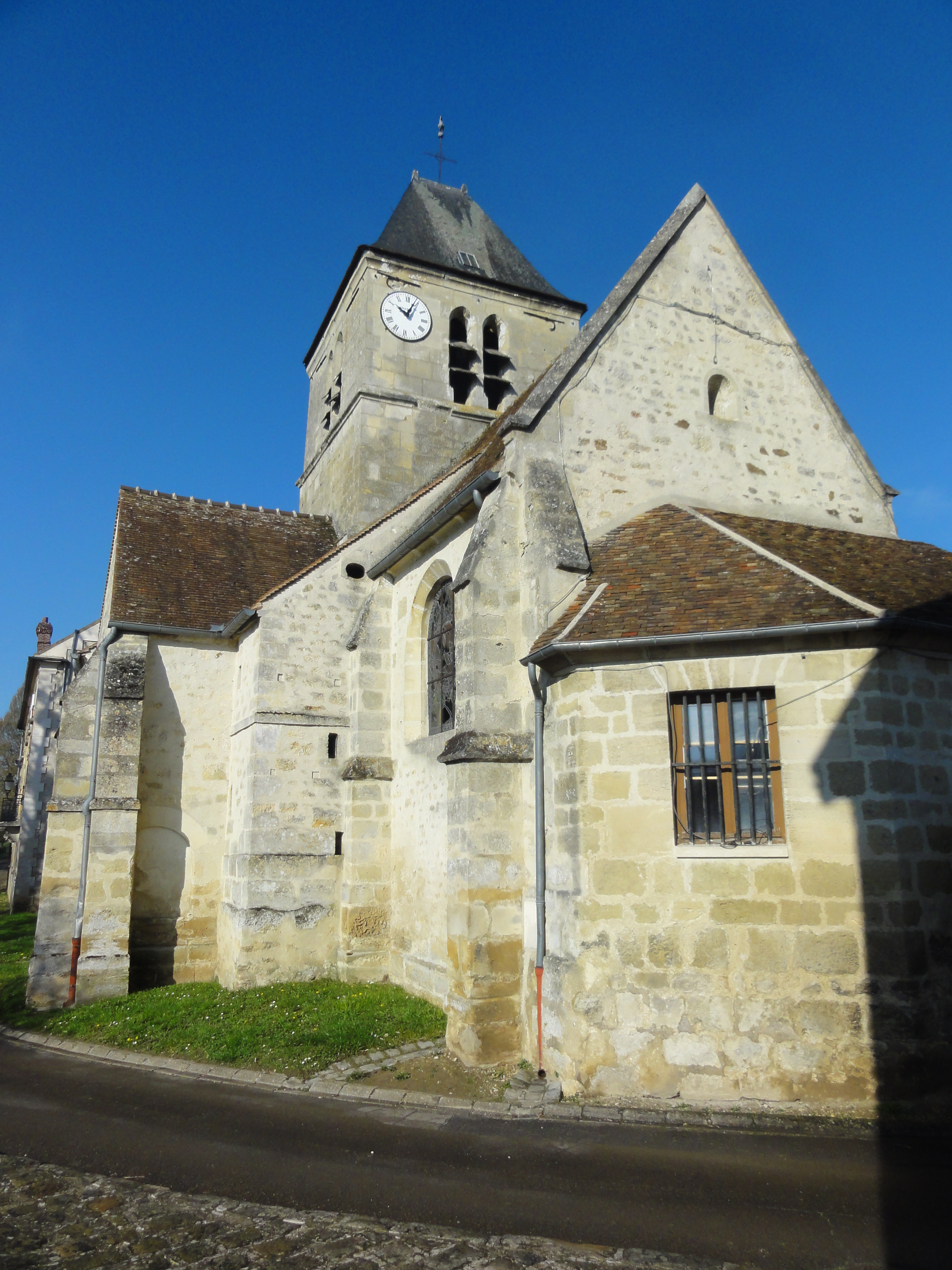 Église Sainte-Marie-Madeleine du Perchay - voir titre.